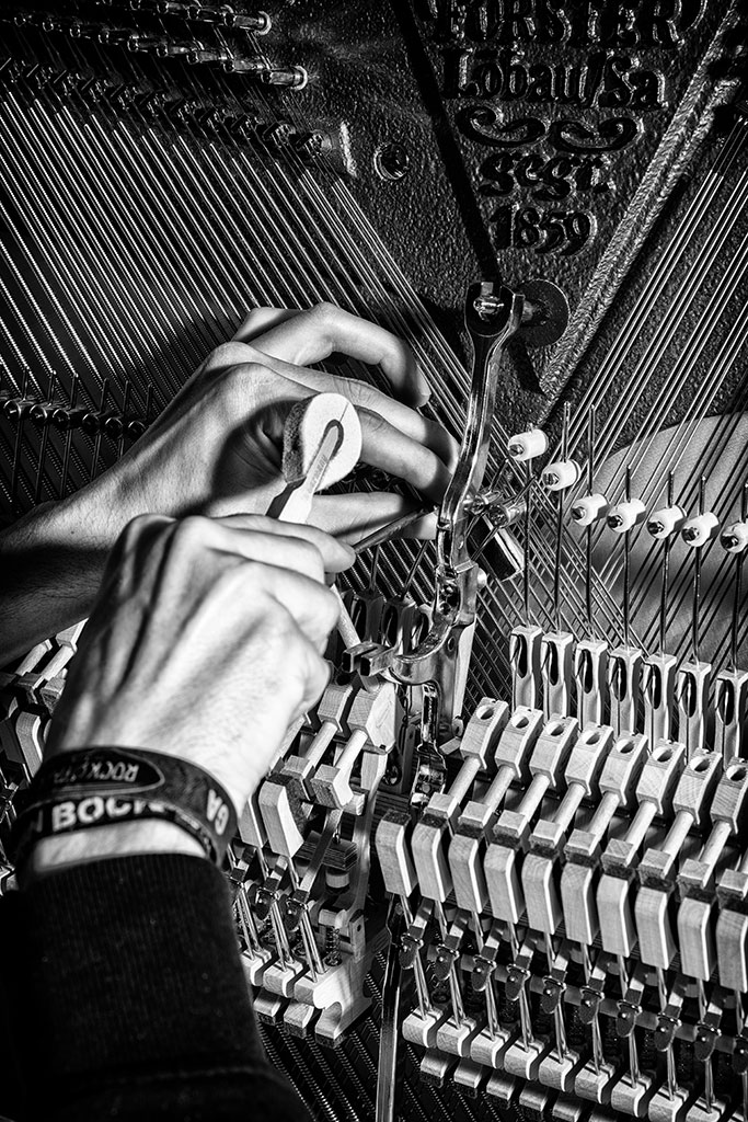 Klavierbauer